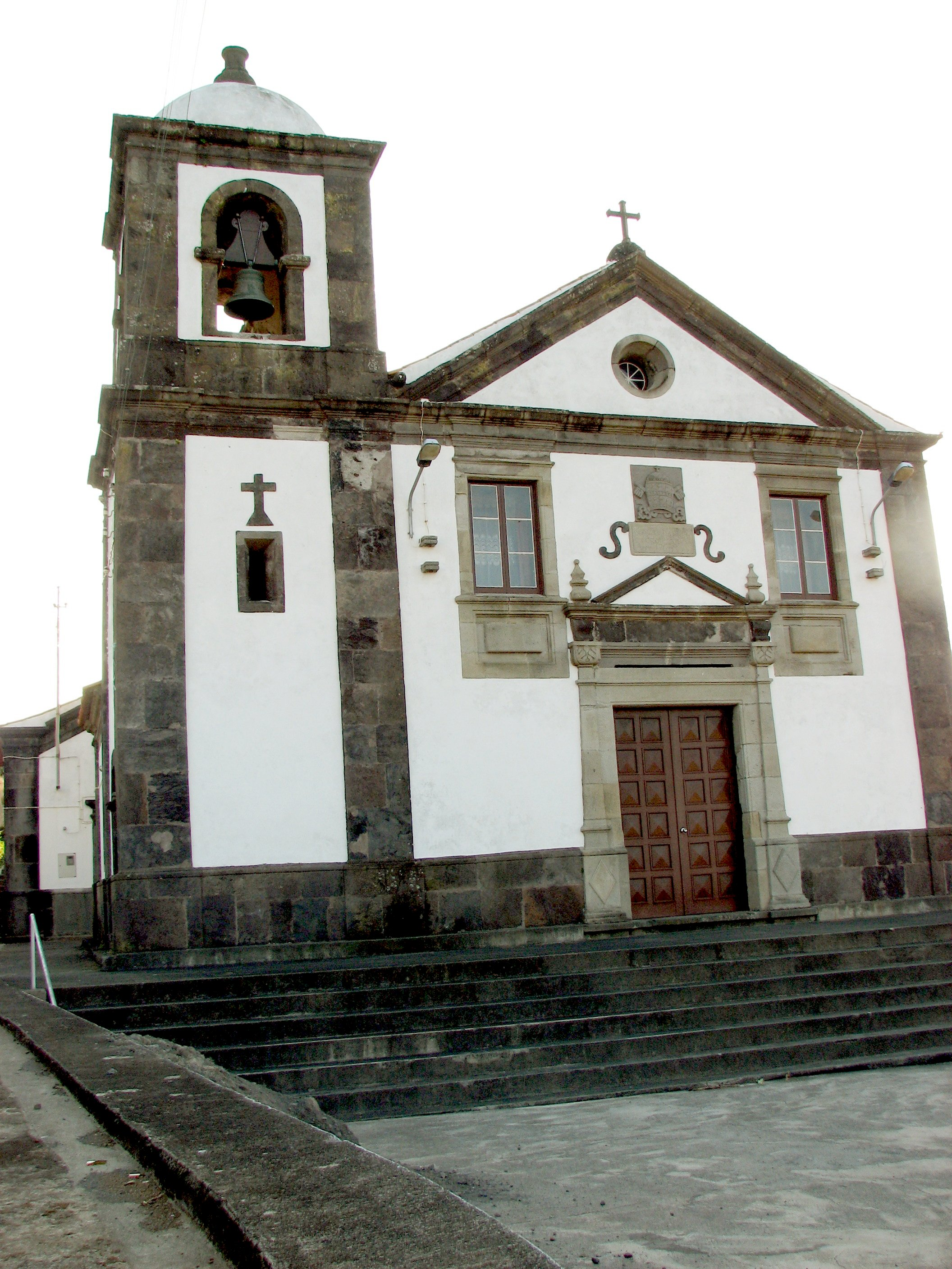 Parish church of São Pedro, Ponta Delgada das Flores, Azores.